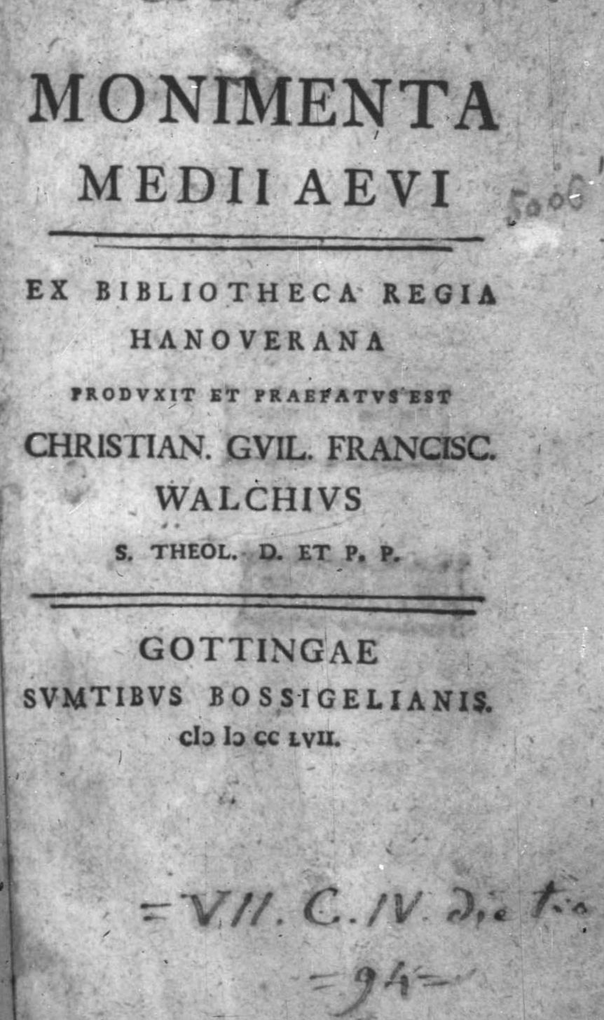 Frontespizio